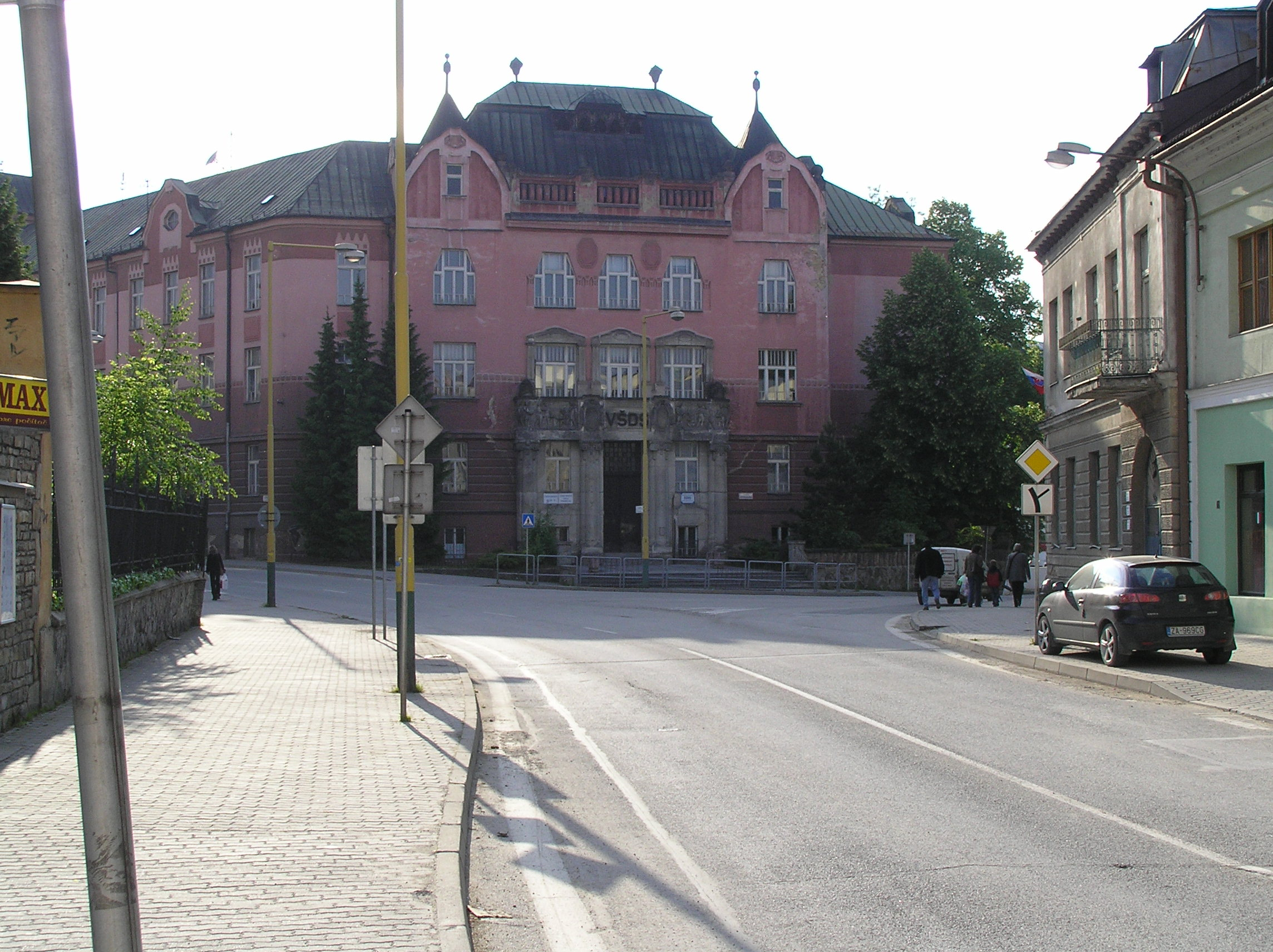 Žilinská univerzita - budova A, Hurbanova, Žilina Hurbanova, Žilina